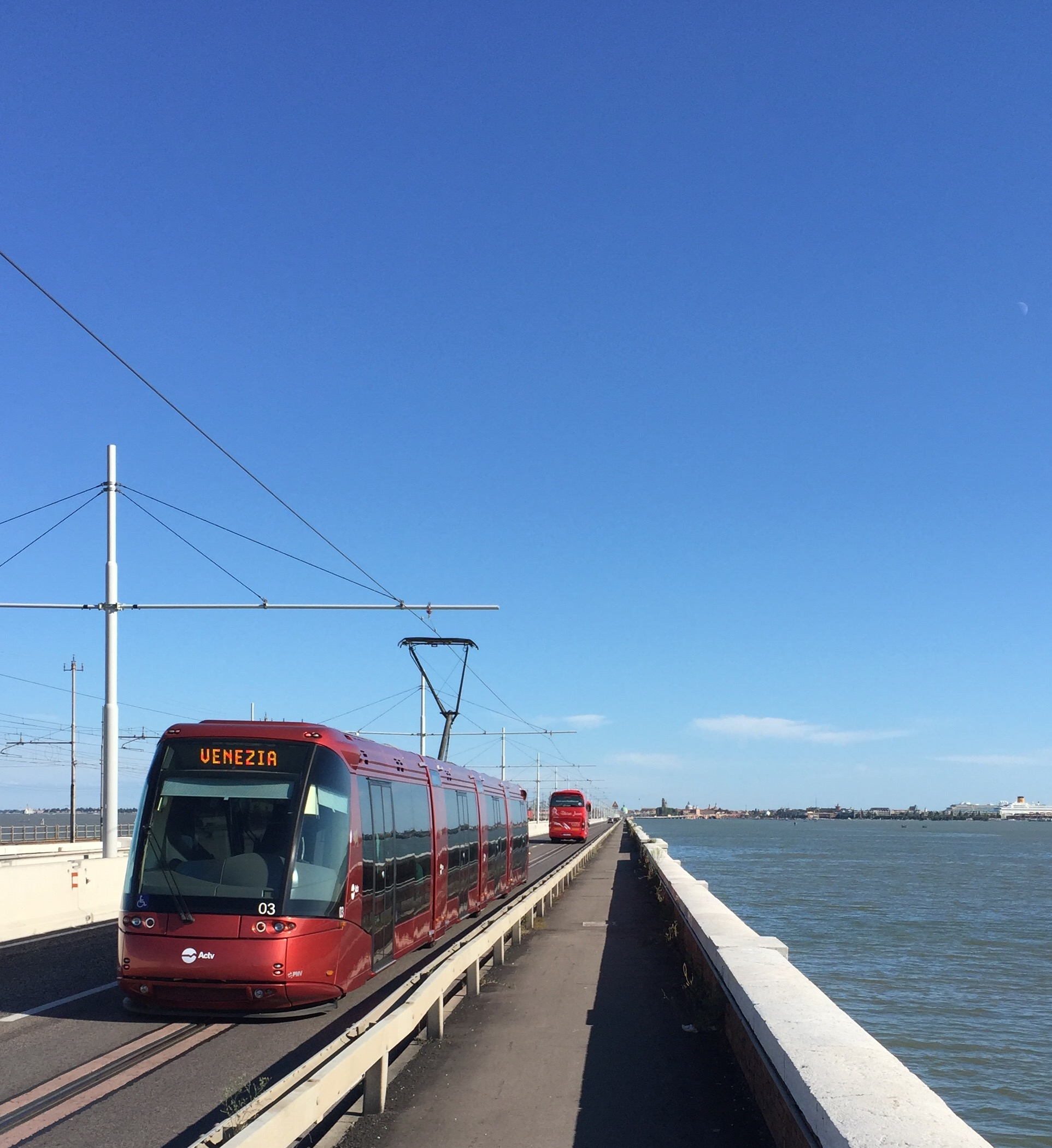 Il convoglio 3 della flotta STE4 della linea T1 della rete tranviaria di Mestre Venezia sul ponte della Libertà in direzione Venezia